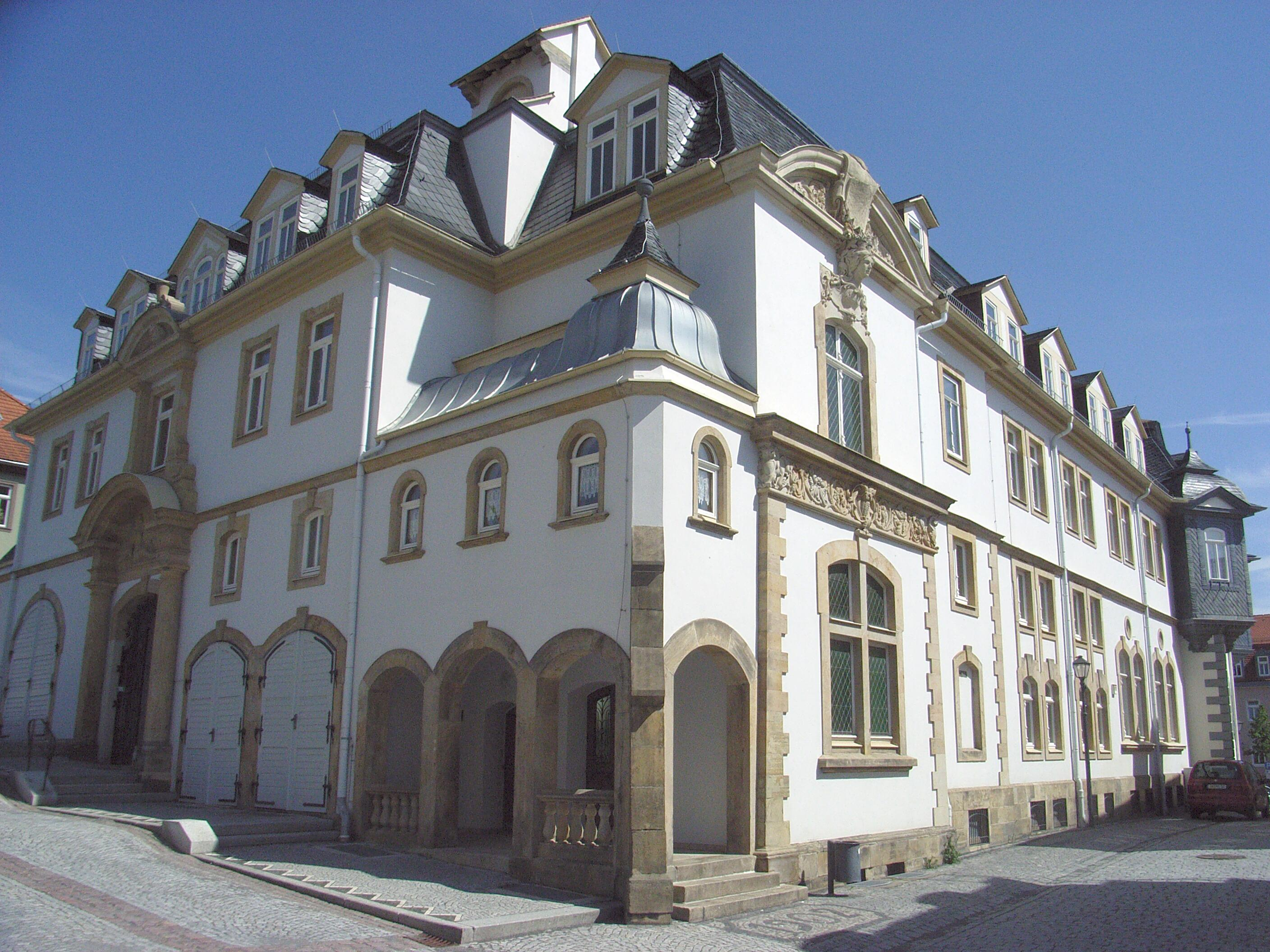 Dieses Bild zeigt das Rathaus von Ilmenau.